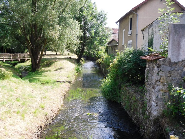 La rivière la Bièvre à Igny (91)